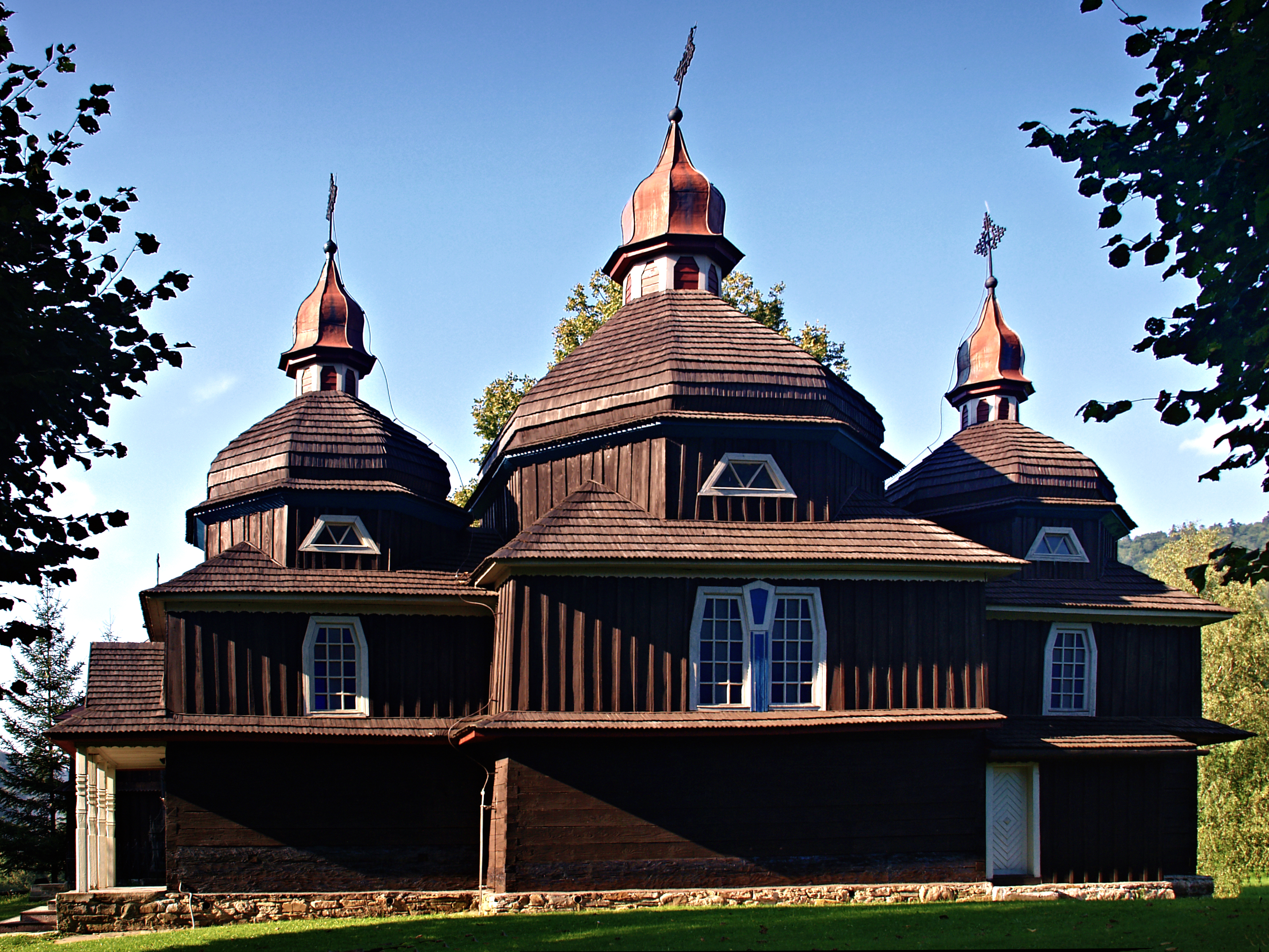 Nižný Komárnik (District de Svidnik - Prešovský kraj) - L'église catholique grecque Ruthène de la Protection de la Mère de Dieu